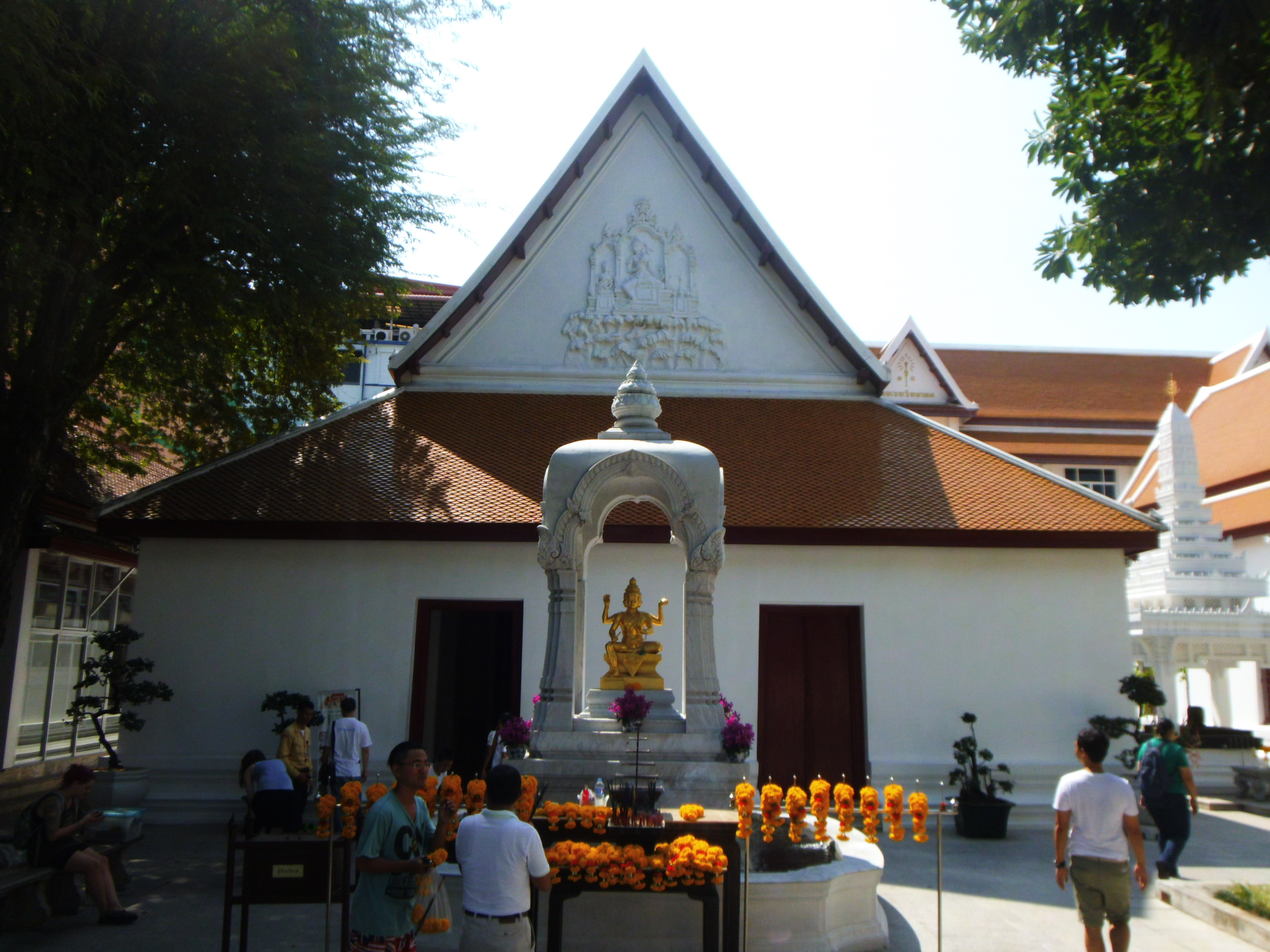 เทวสถานโบสถ์พราหมณ์